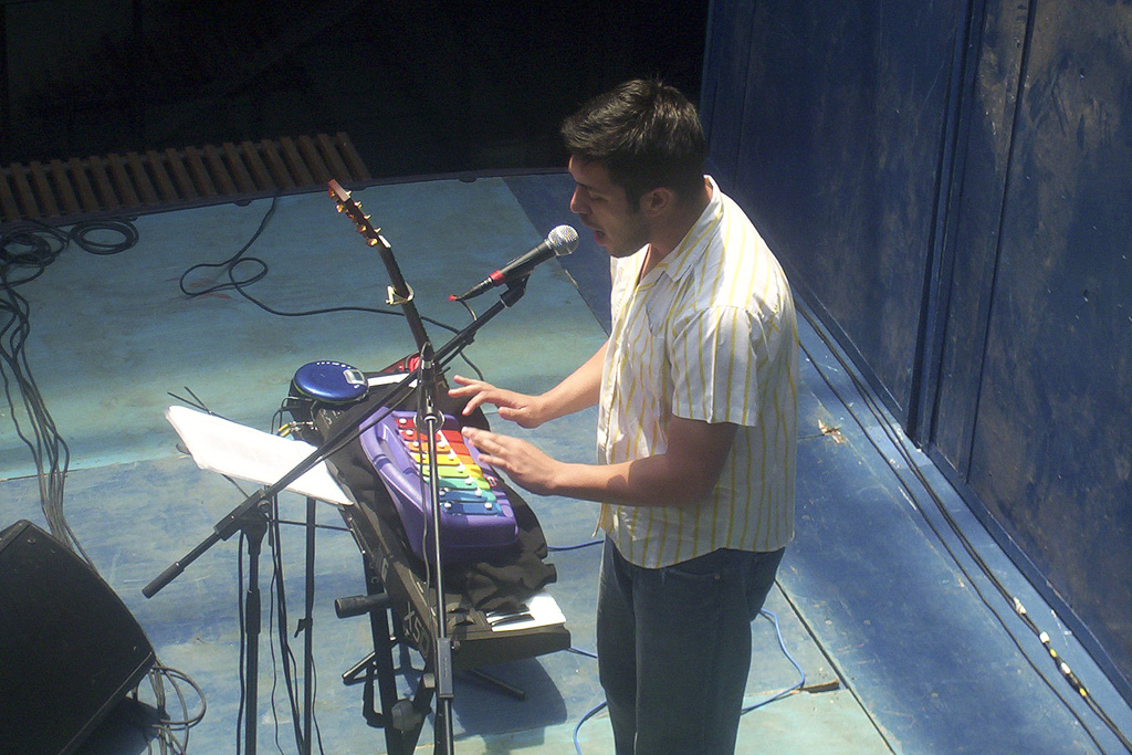 Gepe tocando en el Duoc de Valparaíso el tema: "La enfermedad de los ojos" donde usa un pequeño pianito Fisher Price.